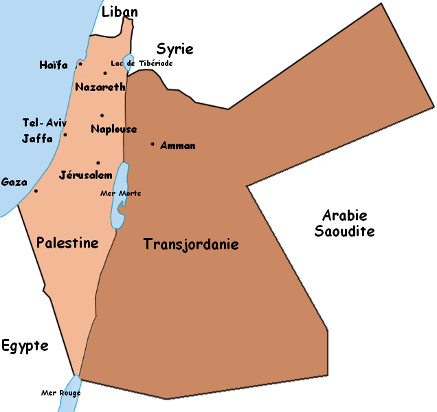 Carte de la Palestine mandataire et de l'Emirat de Transjordanie tels que furent leurs frontières entre 1922 et 1948.